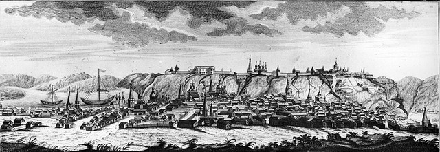 Die westsibirische Stadt Tobolsk, Stich aus dem 18. Jahrhundert.